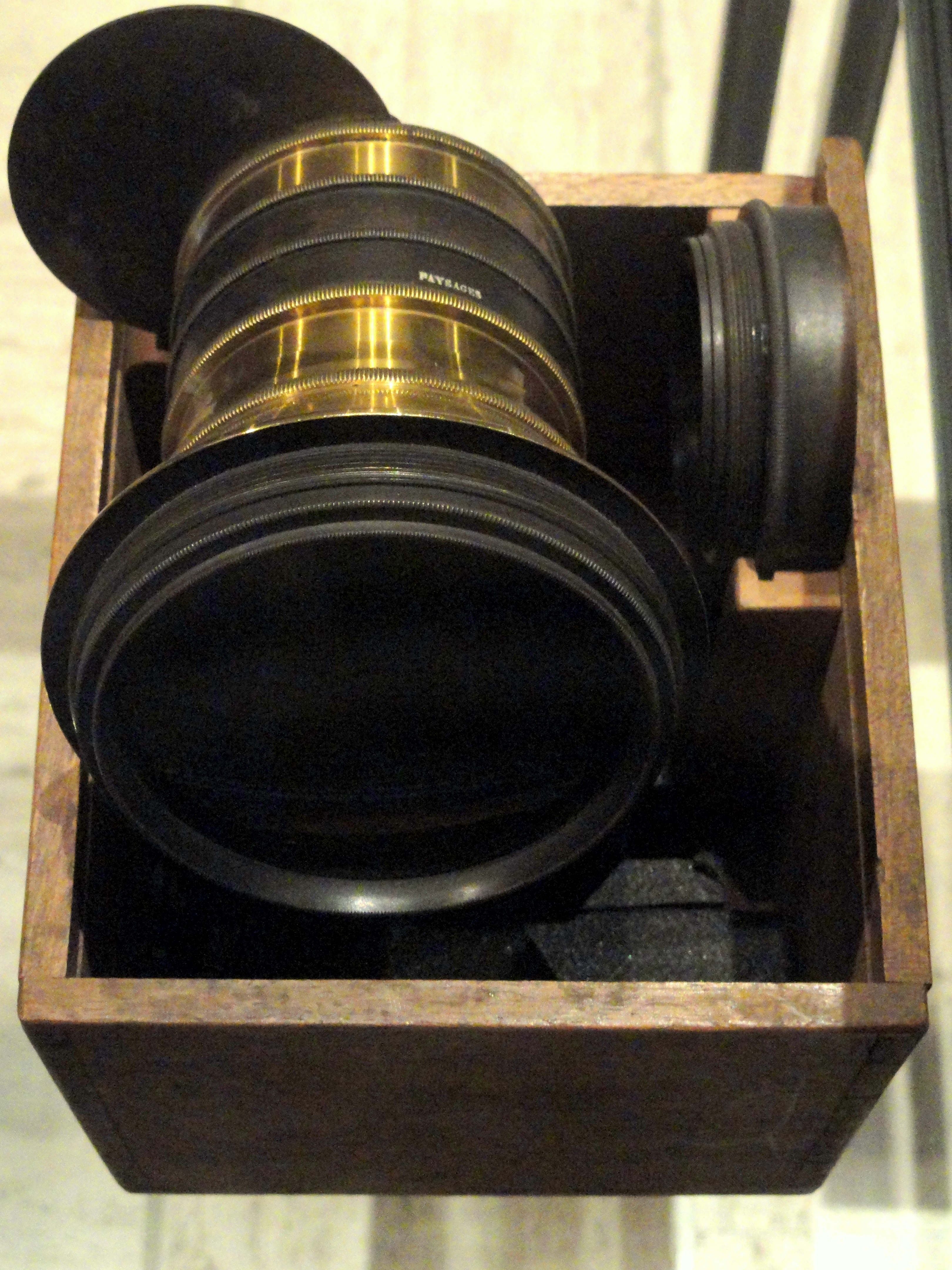 Charles Chevalier, lenses, 1840. Exhibit in the Musée Nicéphore Niépce, 28 Quai Messageries, Saône-et-Loire, France. There were no restrictions on photography in the museum.